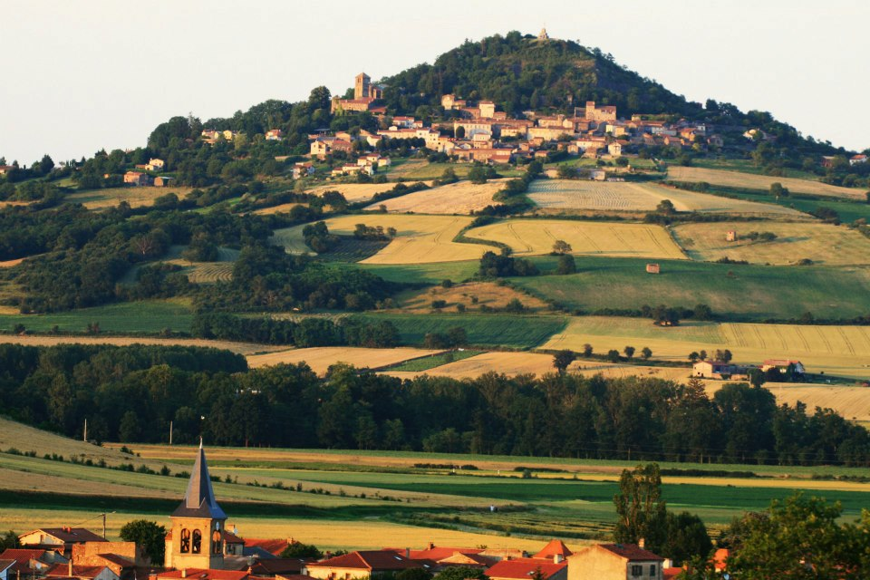 vue sur usson a partir du château